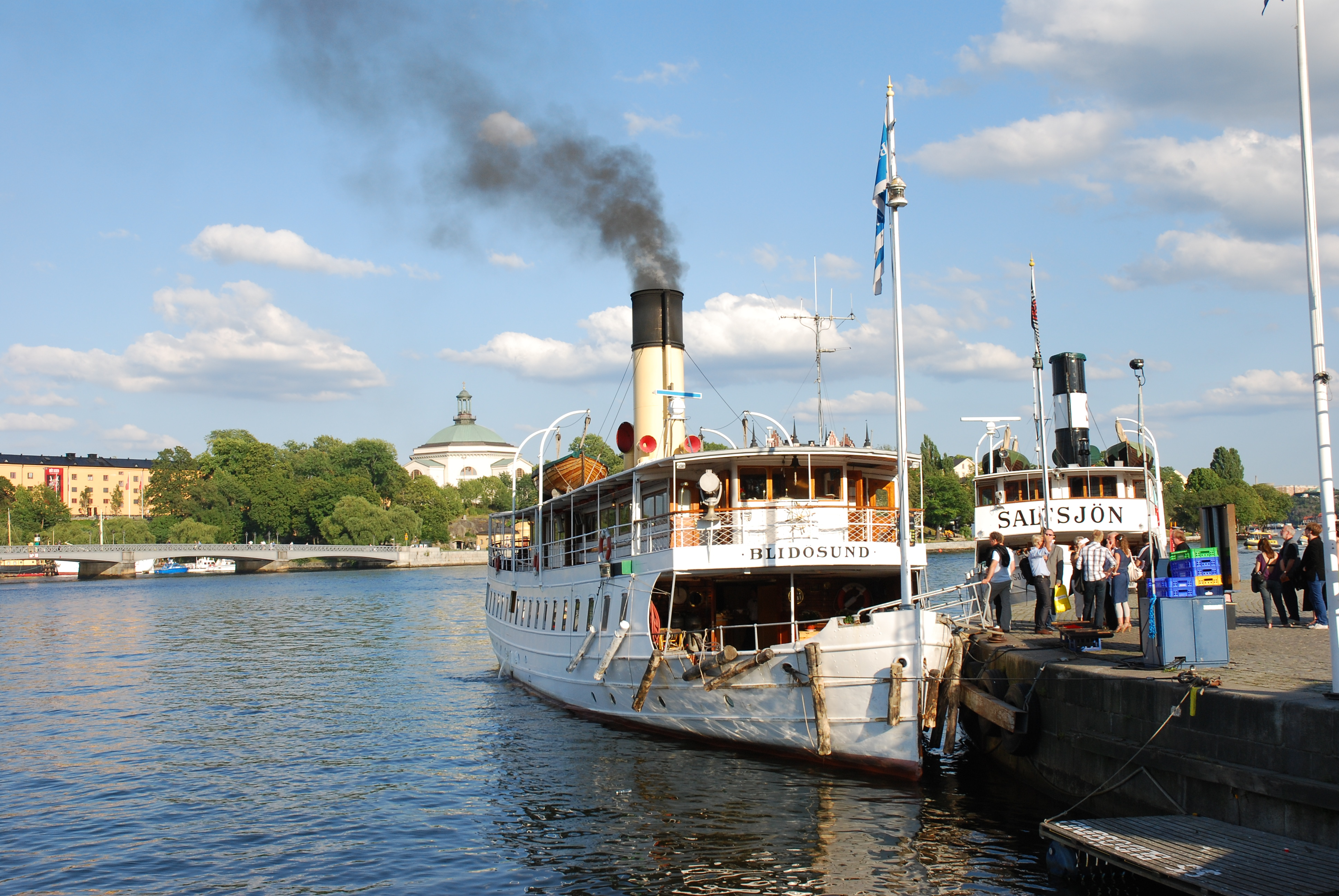 S/S Blidösund